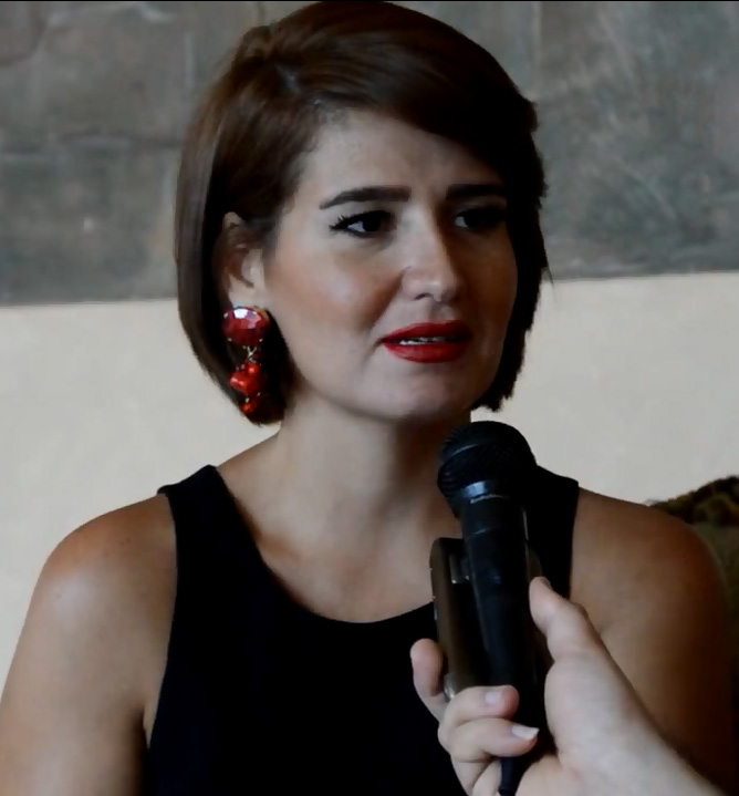 الممثلة المصرية هنا شيحة